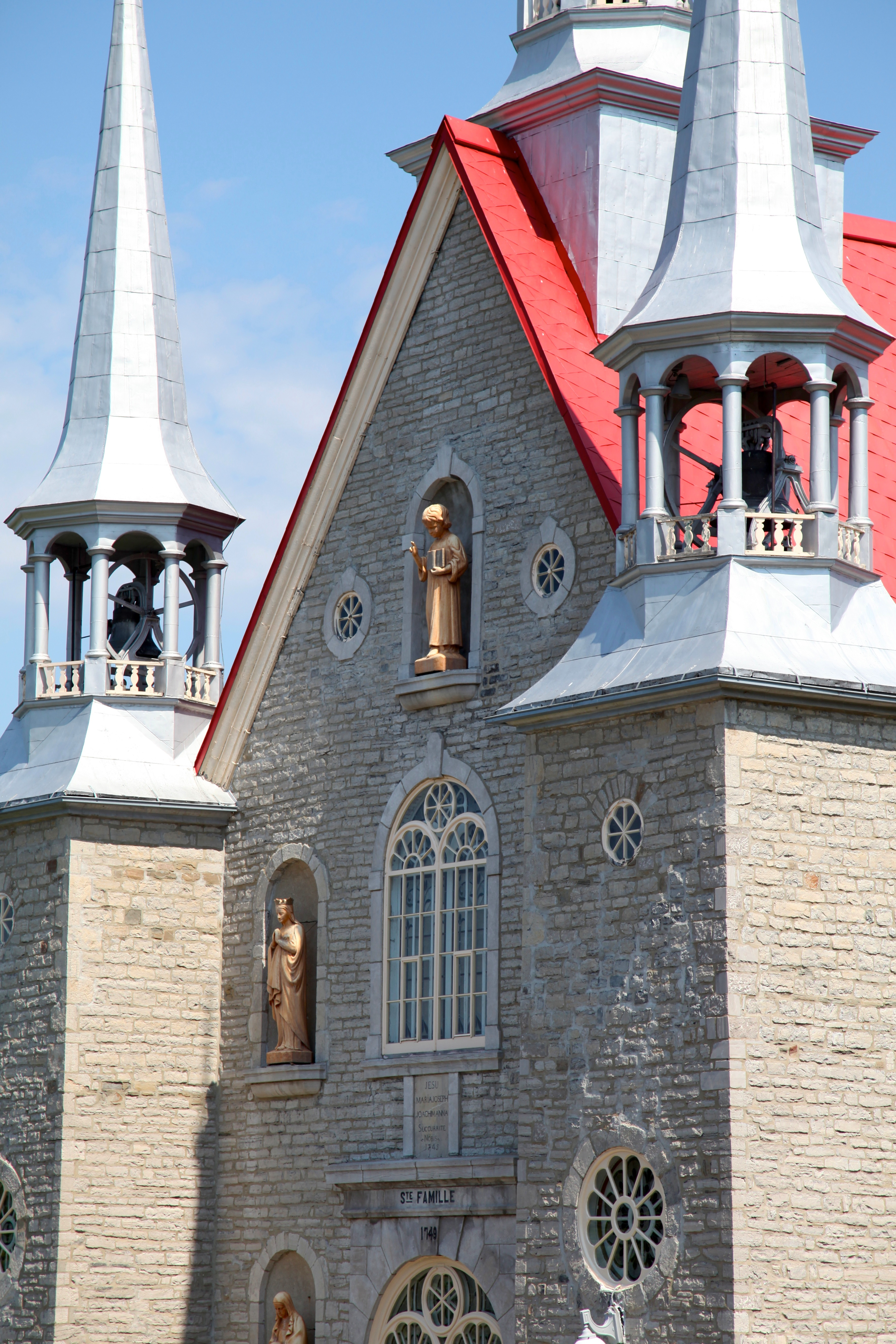 L'église de Sainte-Famille est un lieu de culte de tradition catholique, construit de 1743 à 1747. L'édifice en pierre présente un plan en croix latine composé d'une nef à un vaisseau, d'un transept et d'un choeur étroit terminé par une abside en hémicycle. Sa façade imposante, cantonnée de deux tours carrées hors d'oeuvre couronnées de clochers, est animée d'un portail central, d'une grande fenêtre cintrée, d'oculus et de cinq niches comportant chacune une statue. Située en bordure du chemin Royal, l'église s'élève au coeur du noyau villageois de la municipalité de Sainte-Famille, la plus vieille paroisse de l'Île d'Orléans. L'église de Sainte-Famille fait partie de l'arrondissement historique de l'Île-d'Orléans.